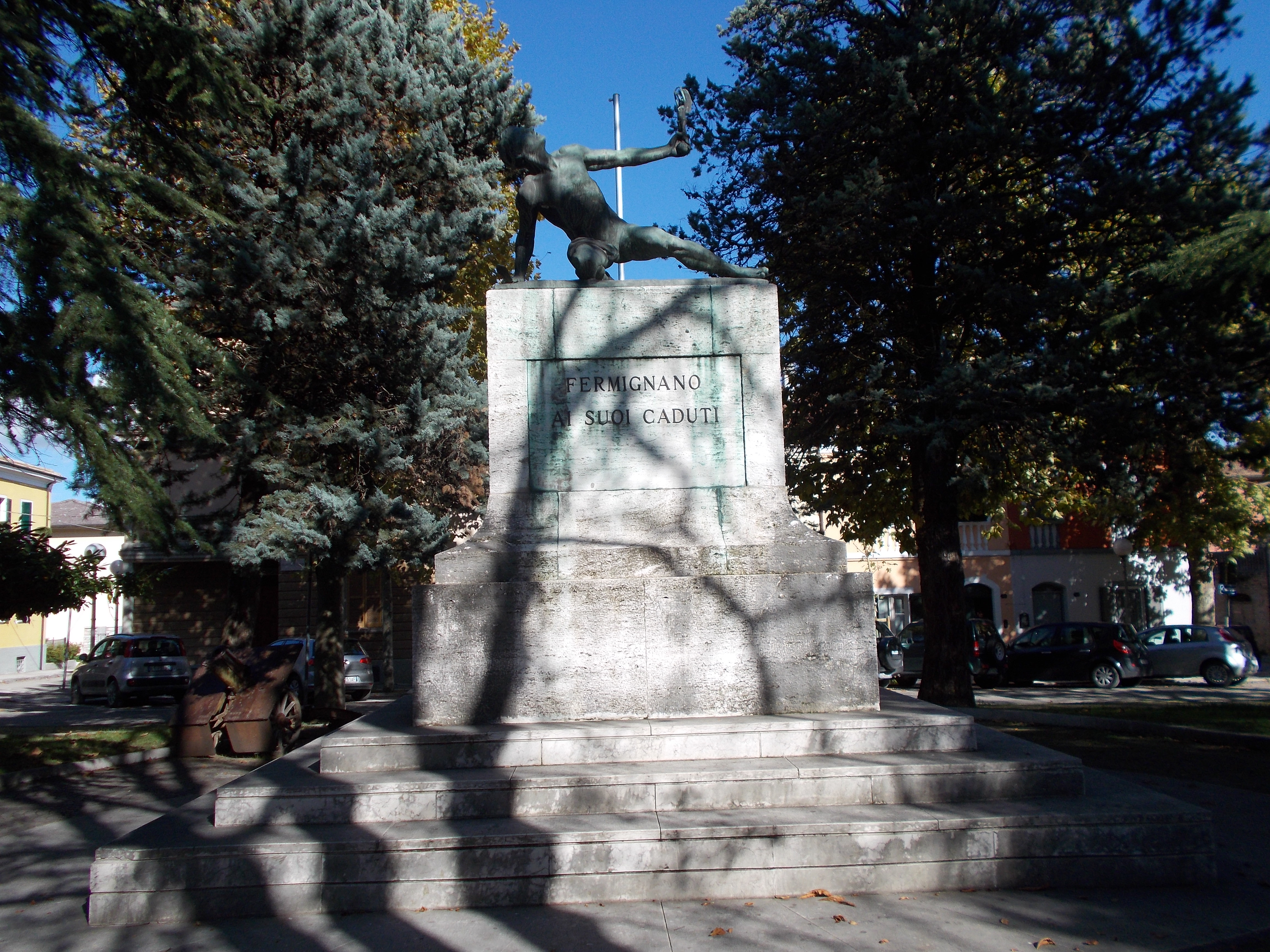 Le Monument aux Morts